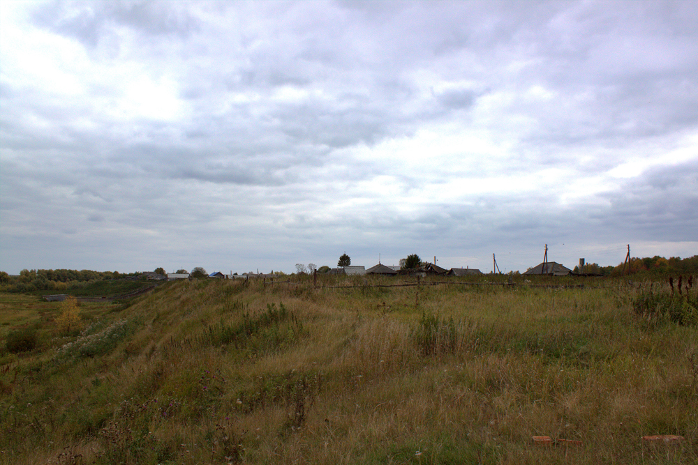 Бутаково, вид с Иртыша